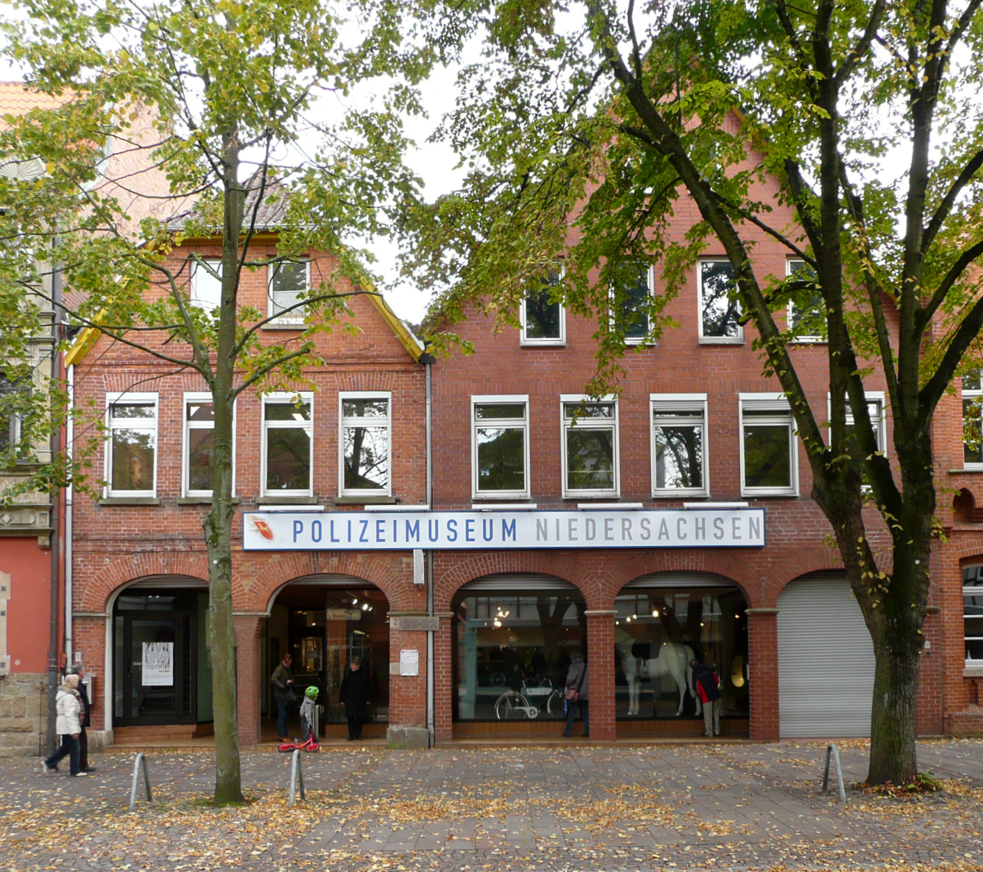 Polizeigeschichtliche Sammlung Niedersachsen in der Fußgängerzone in Nienburg